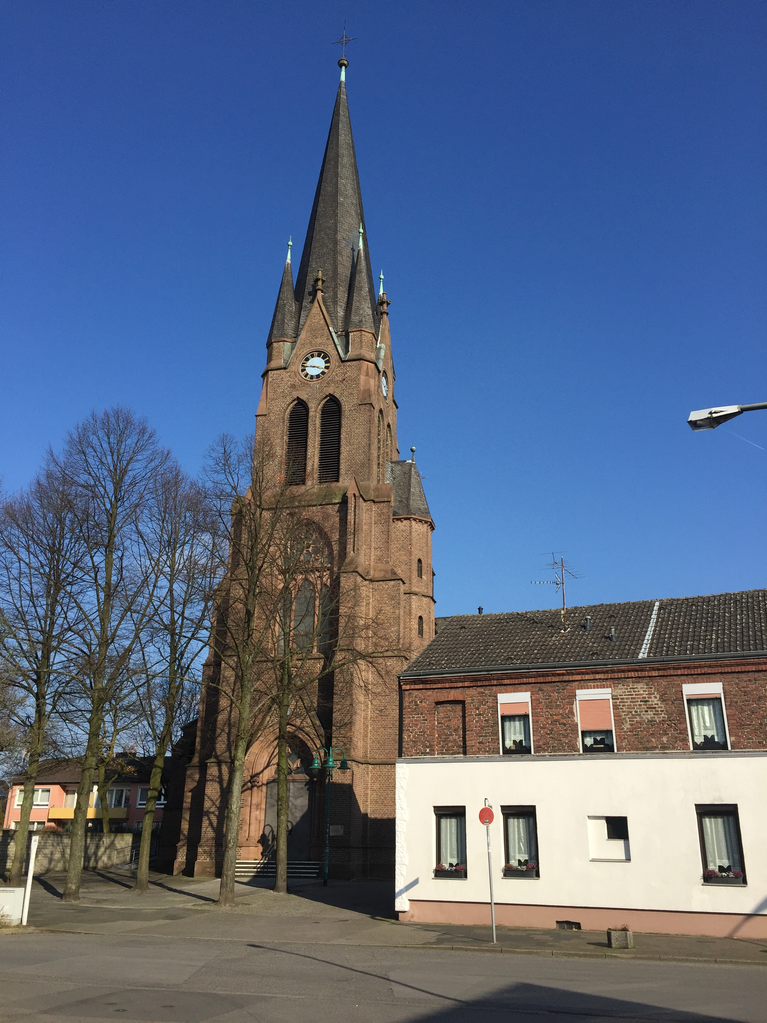 2016-03-13 St. Peter und Paul-Kirche Huckingen